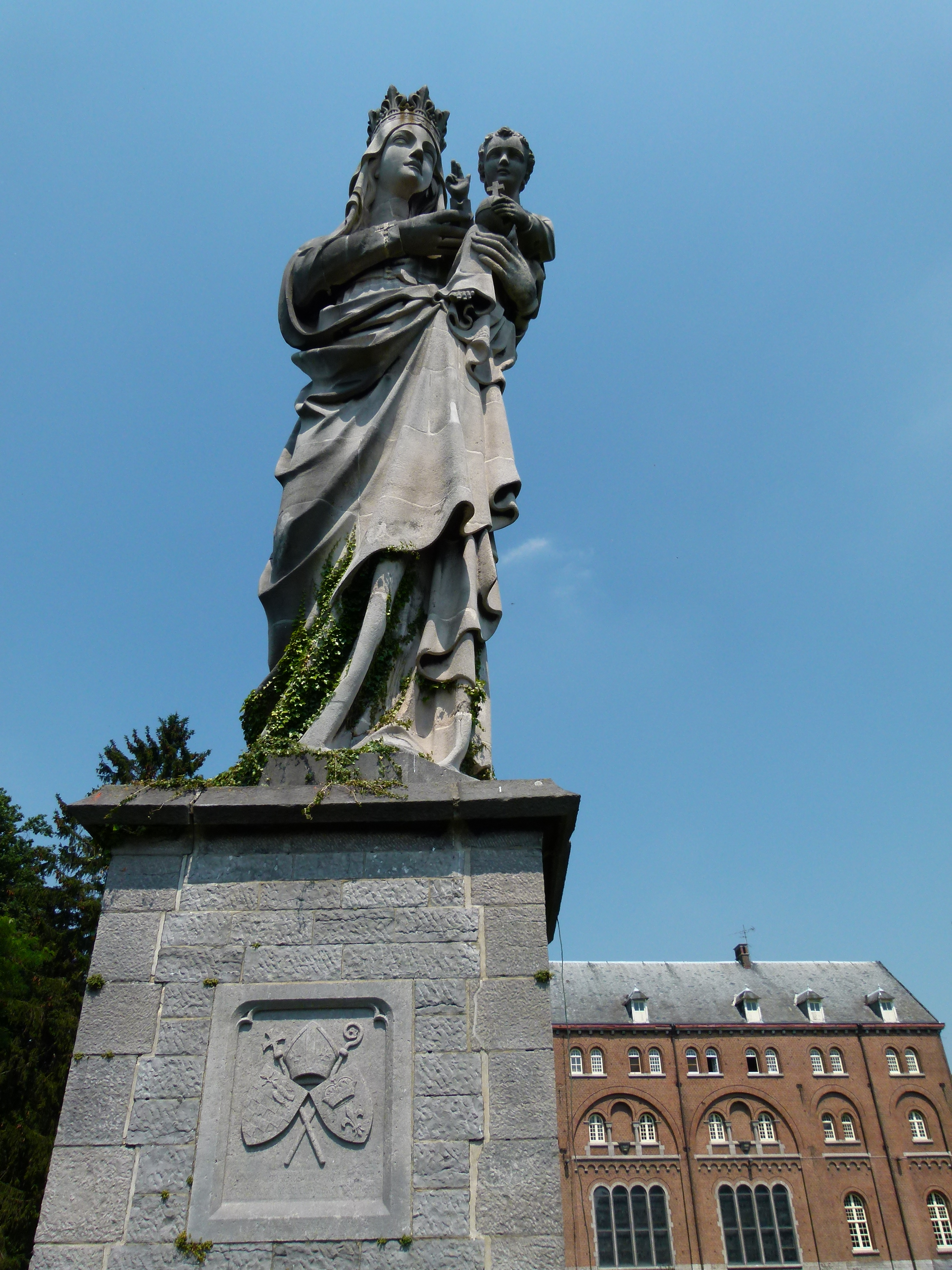 Maria beeld aan de Abdij van Keizersberg te Leuven